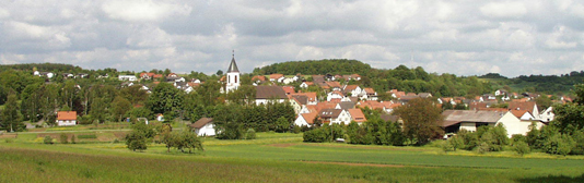 Ortsansicht von Schlierstadt, Stadtteil von Osterburken. Fotografiert von Wolfgang Beckert.